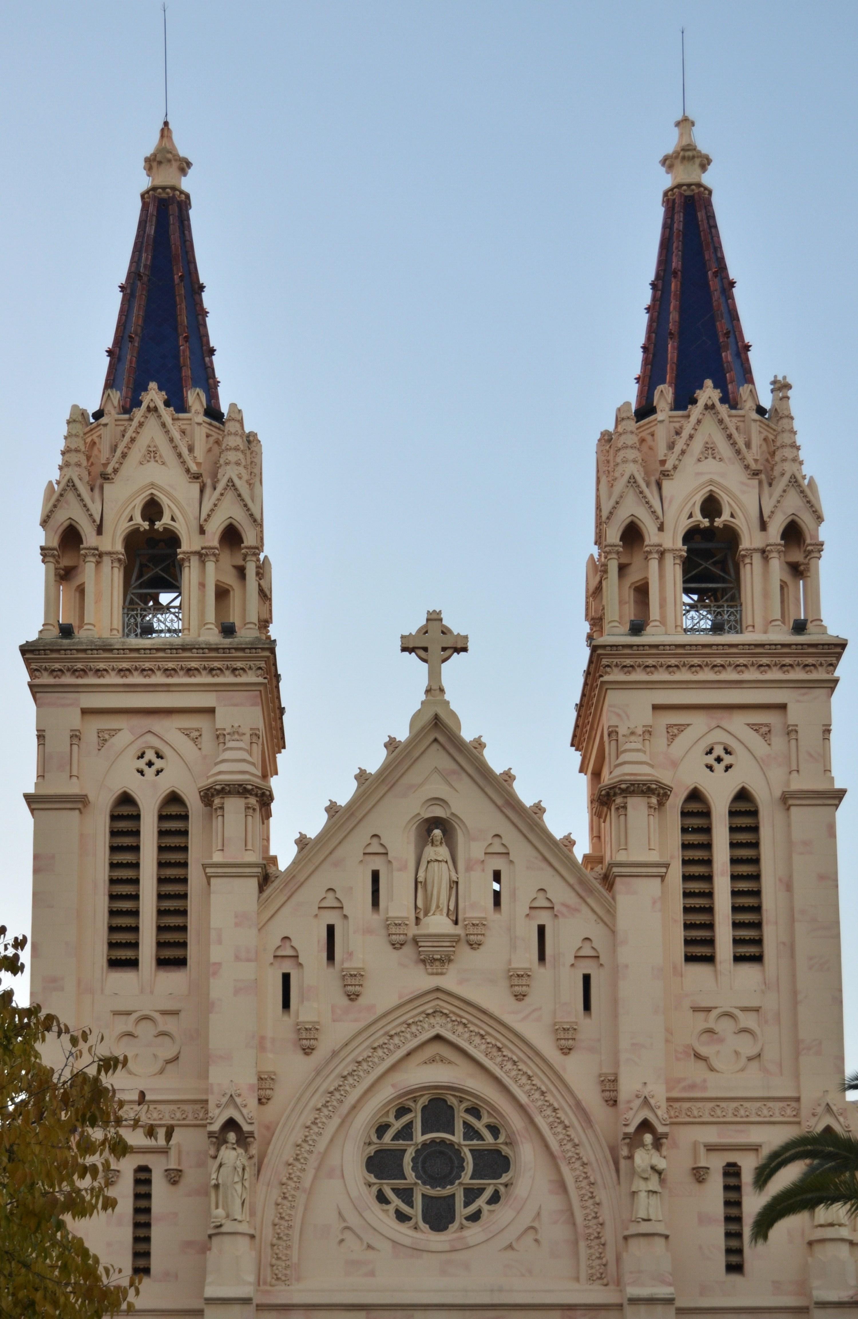 Campanars del convent de les Esclaves del Sagrat Cor, Benirredrà.